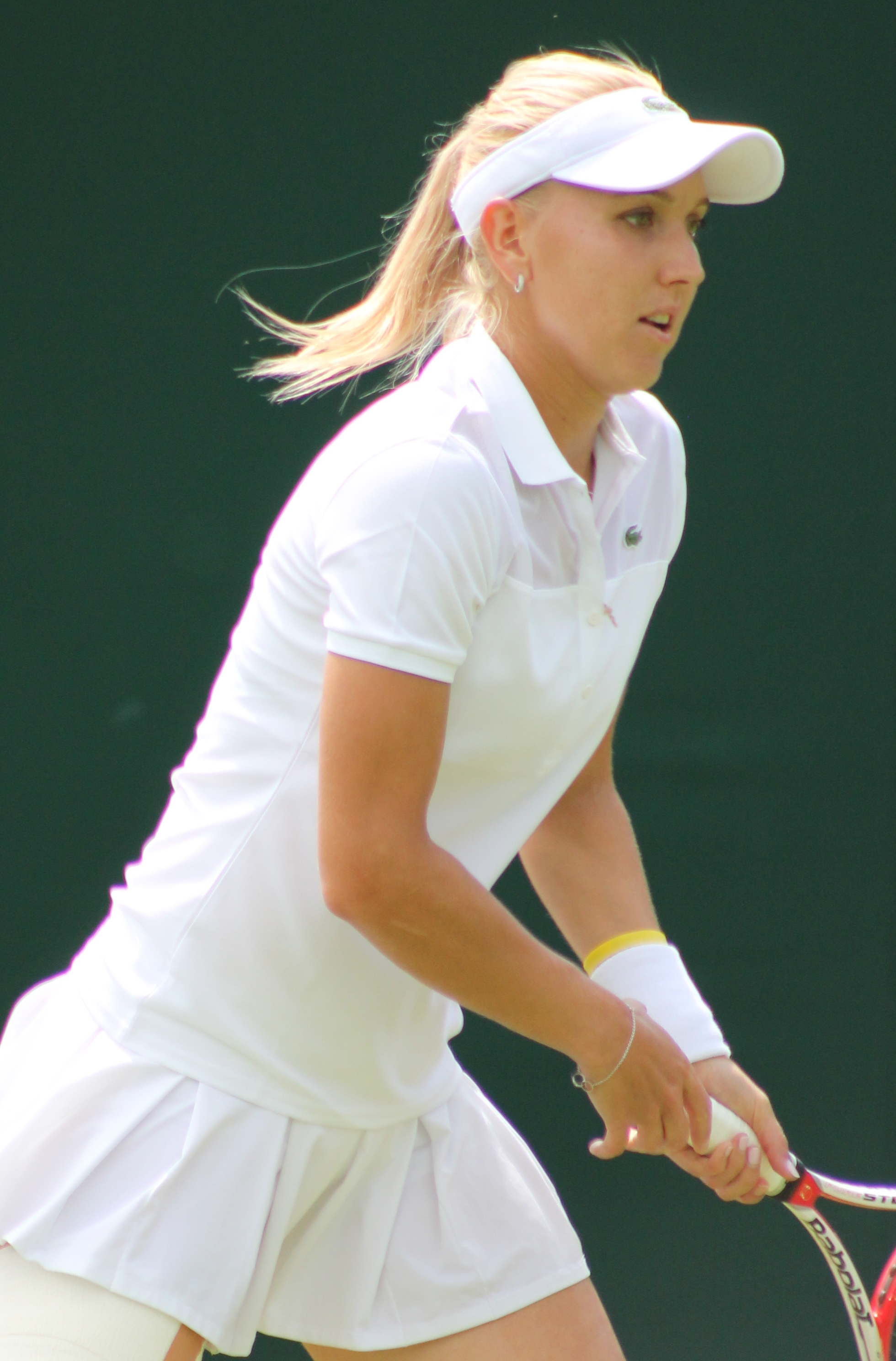 Vesnina WM14 (5)